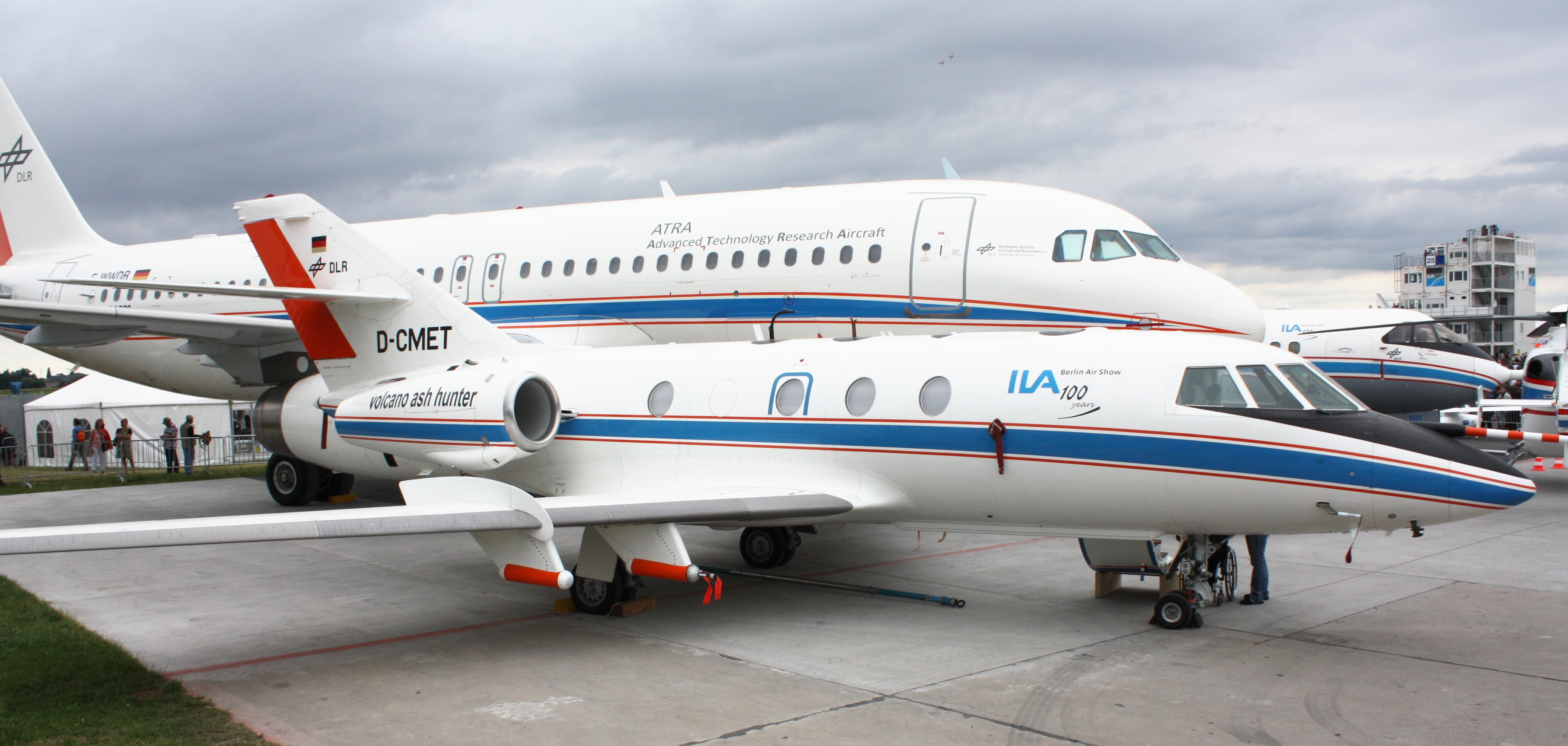 ILA 2010, am Samstag aufgenommen, meist erhöht von einer Leiter fotografiert